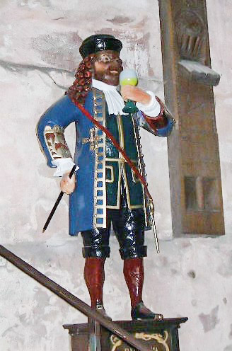 Perkeo in Heidelberg Castle. Taken Spring 2003.